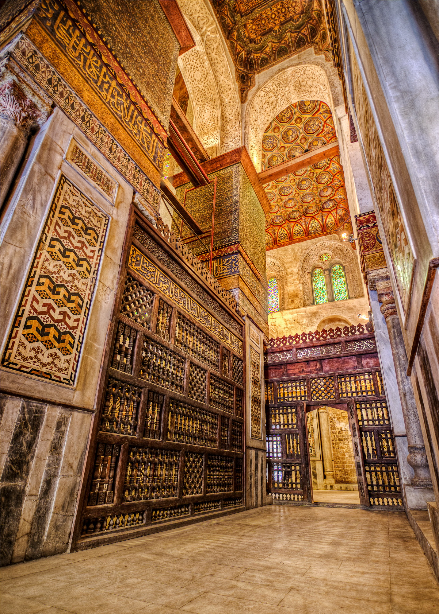 ضريح الناصر محمد بن قلاوون و ما يحيط به من جمال و روعة معمارية - بشارع المعز لدين الله الفاطمي (القاهرة)